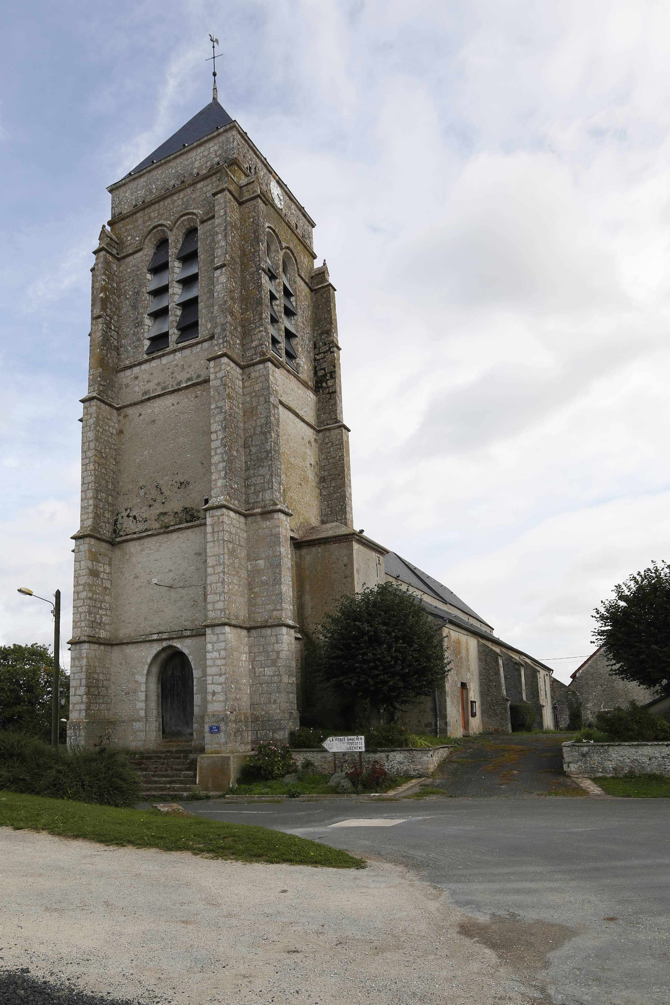 Église Saint-Pierre de Sancy-lès-Provins.